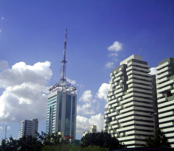 Sede da Rádio Mix em São Paulo.